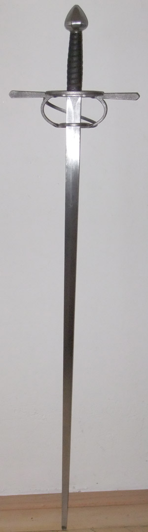 Replik eines italienischen Spada da Lato